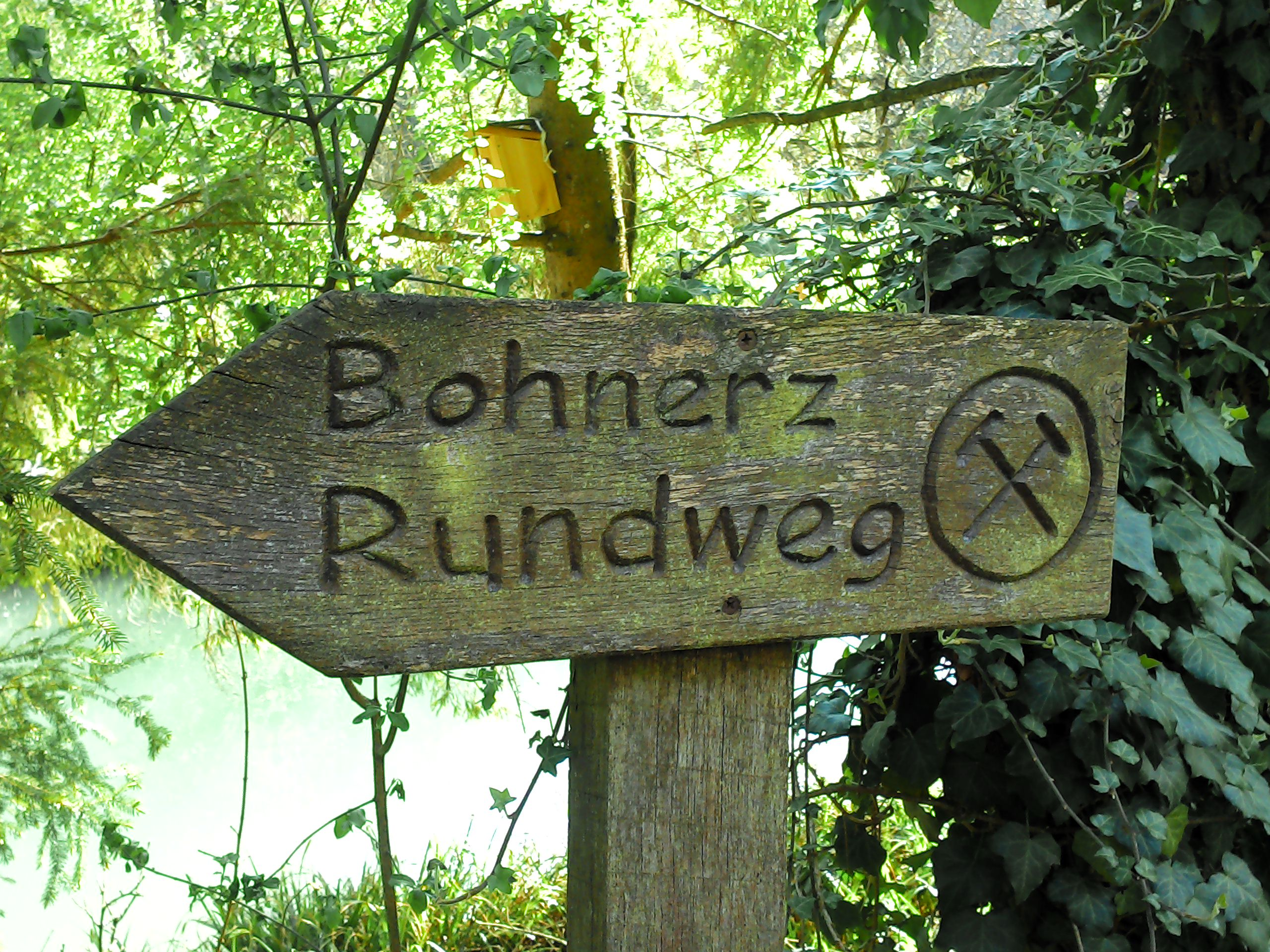 Der Erzkessel bei Küßnach, Gemeinde Küssaberg in Baden-Württemberg. Hinweisschild zum Rundweg um die Anlage.